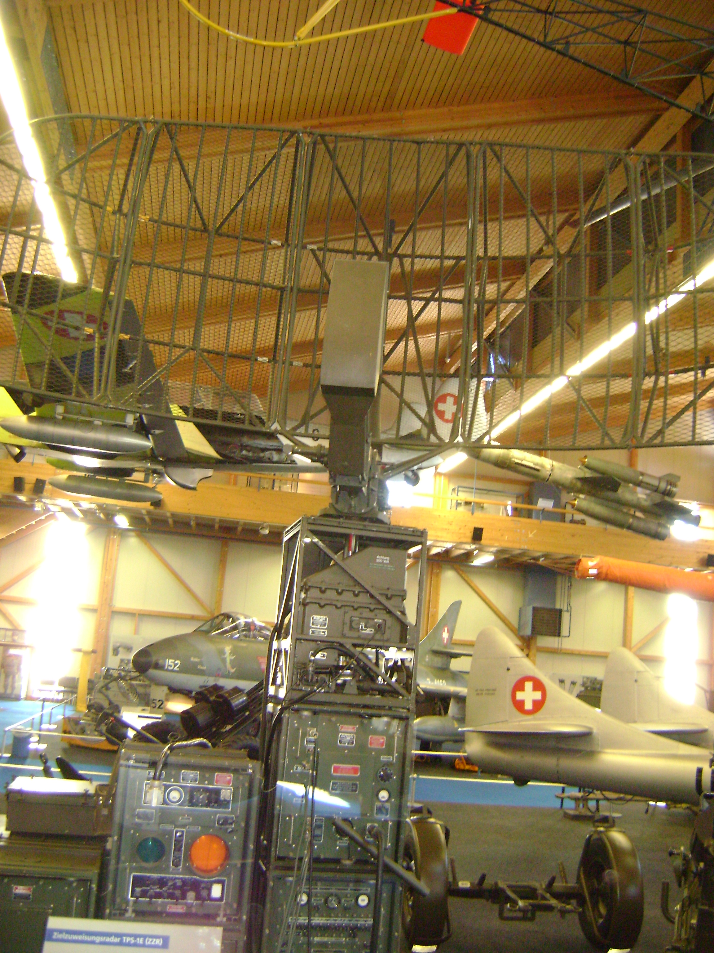 WW2 Radar mobil